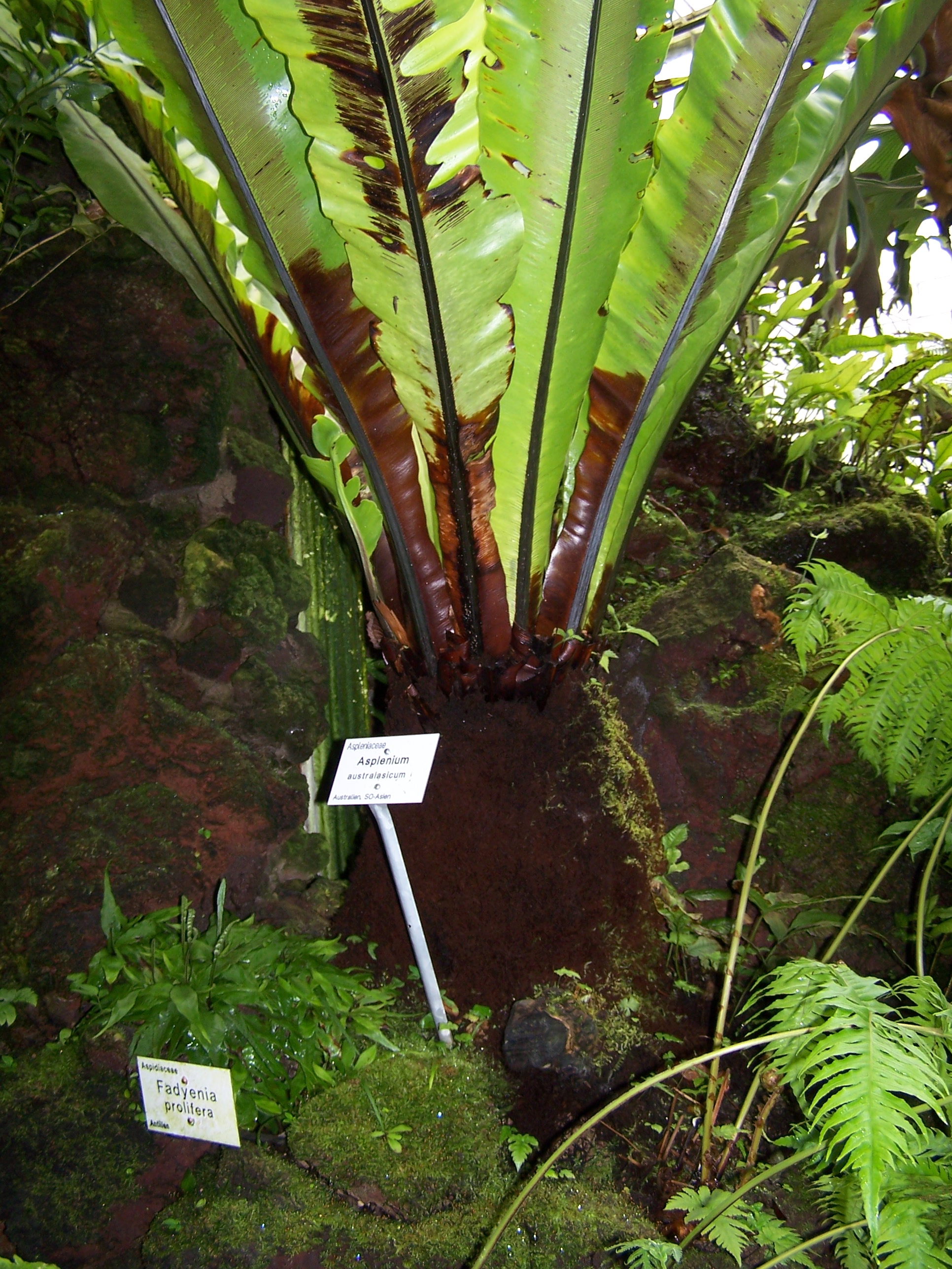 Asplenium australasicum 17 juin 2006 Vieux jardin botanique de Göttingen